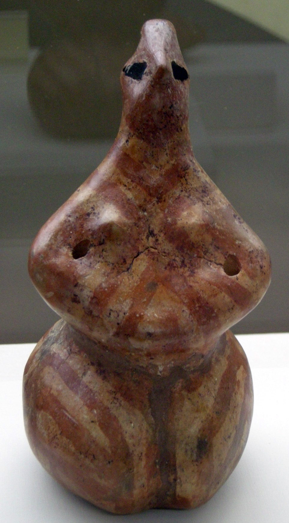 Archeologico firenze, statuetta idolo in terracotta, 5250-5000 a.c., da hacilar (turchia)